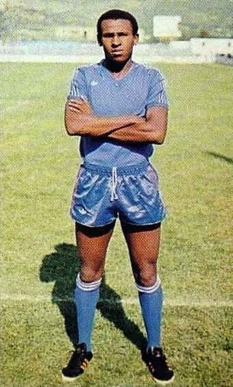 Merry Krimau en 1976, 'Panini Football 1976 - 1977', Panini football n°39.